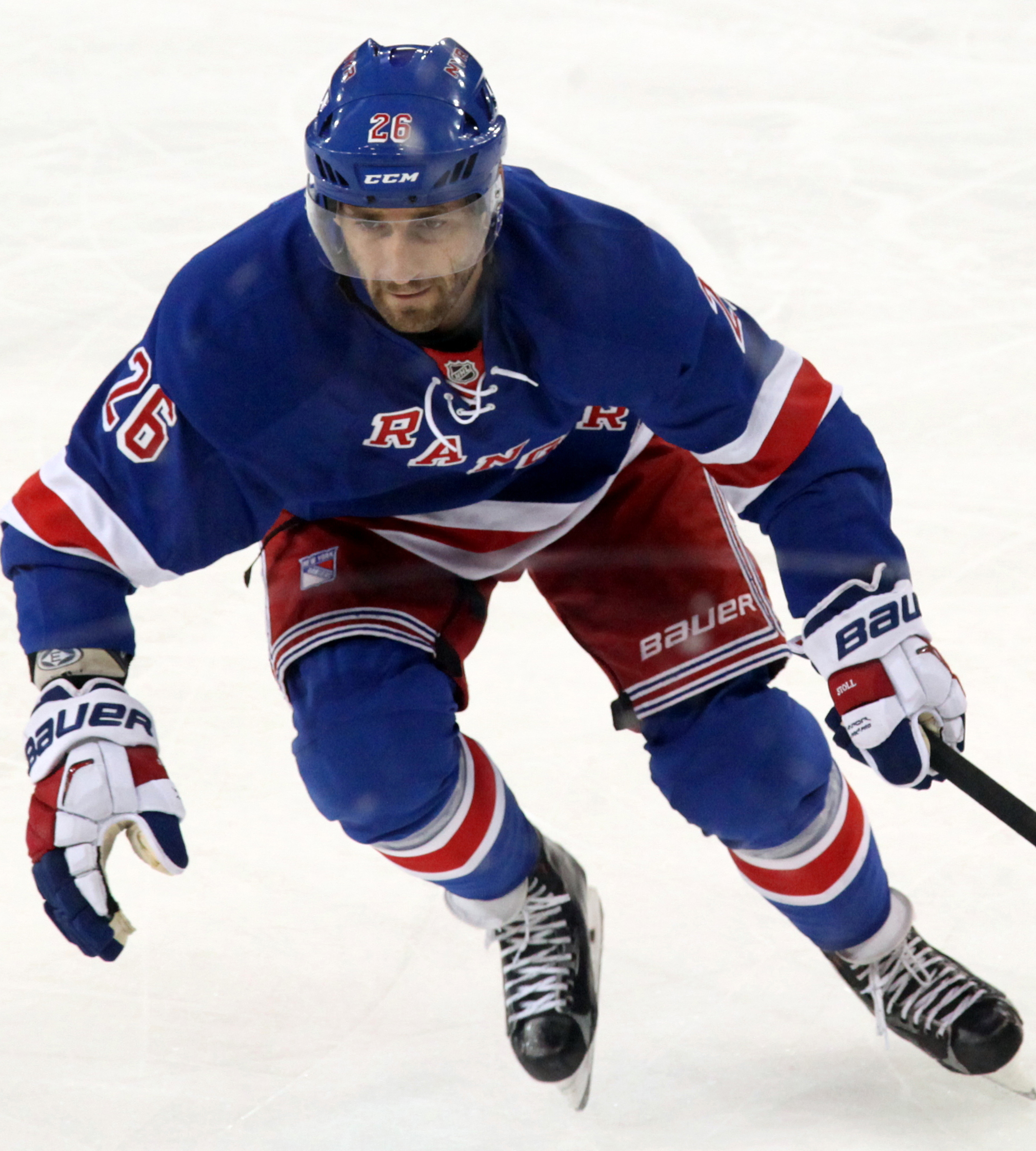 Stoll in September 2015.